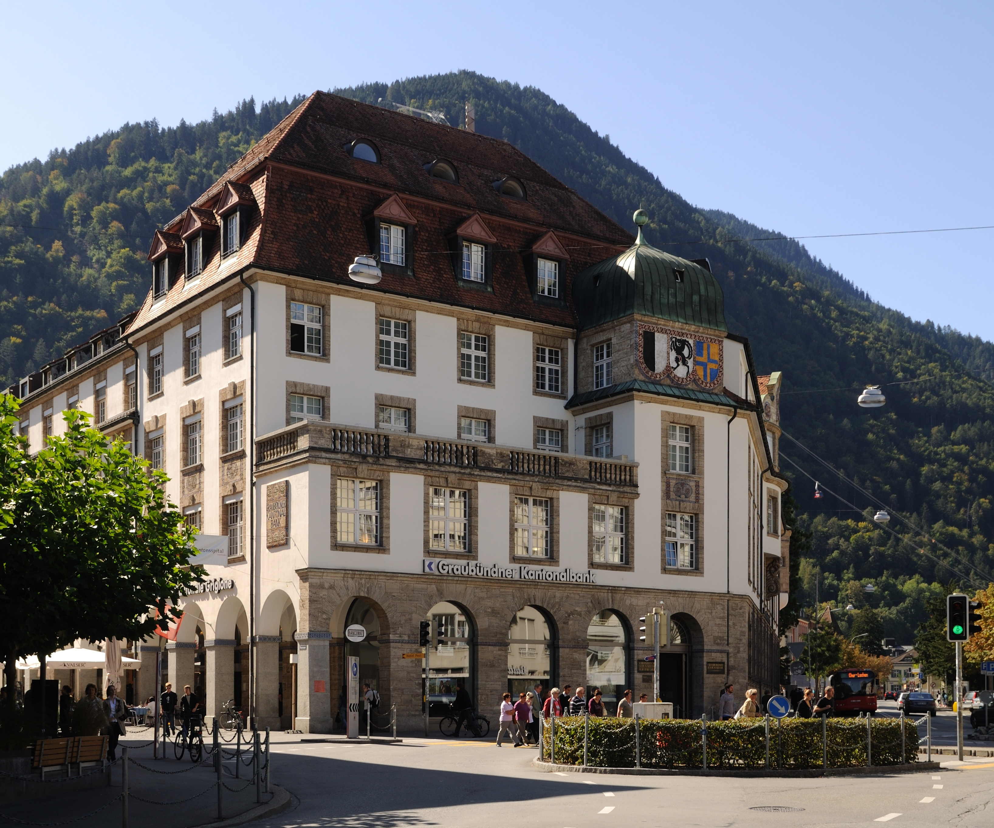 Chur: Hauptstelle der Graubündner Kantonalbank